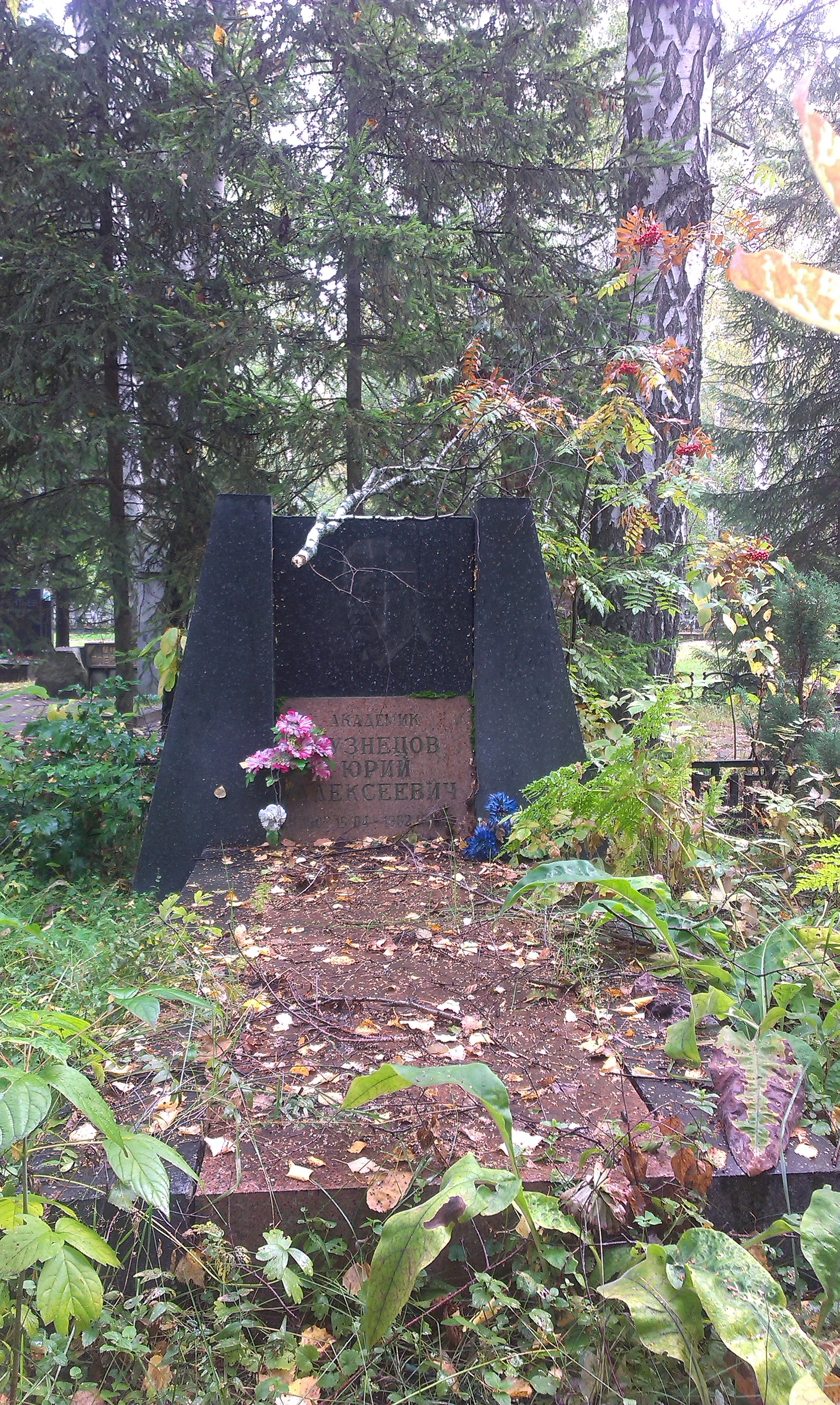 Южное (Чербузинское) кладбище